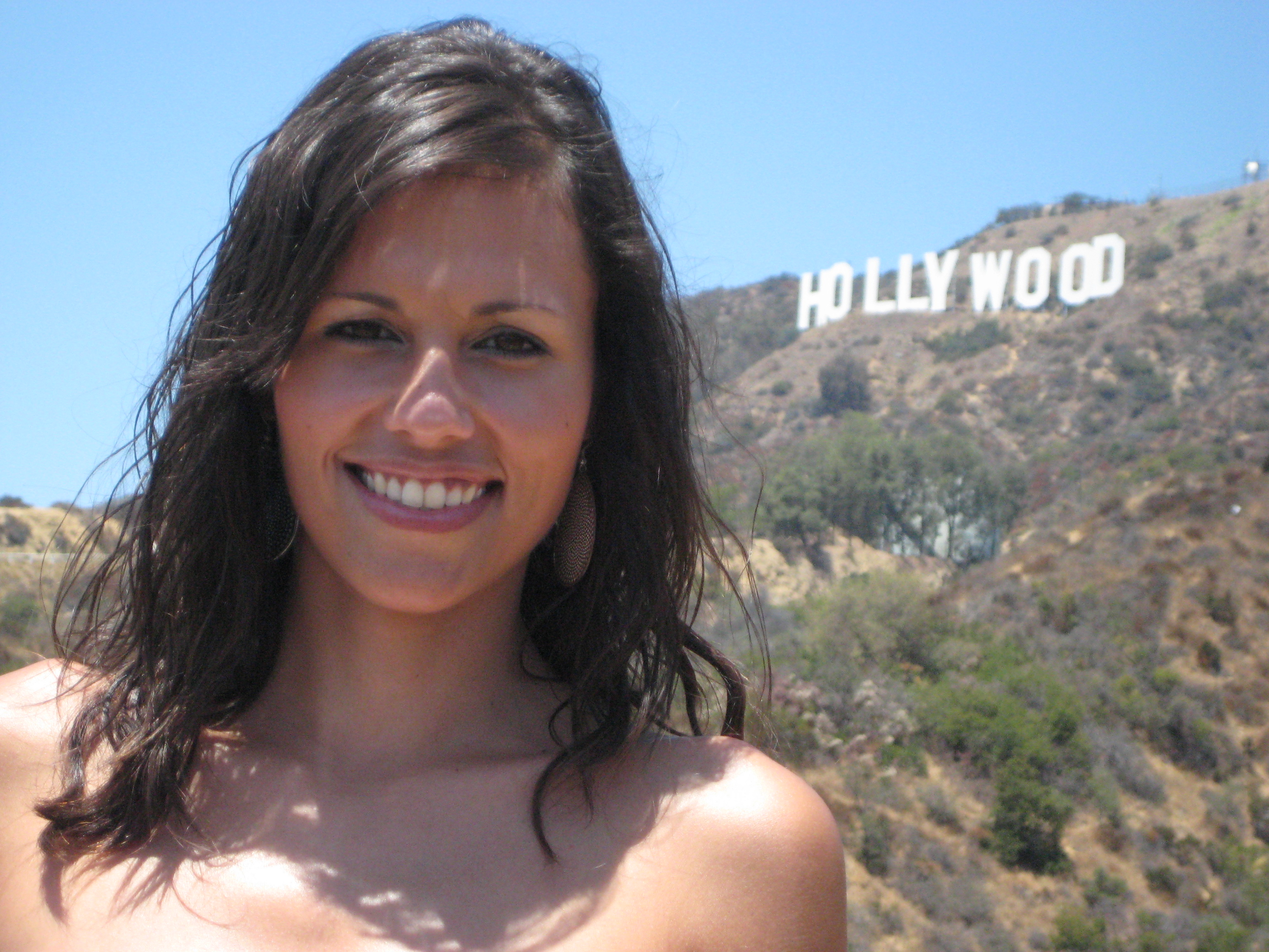 Estela Giménez en Los Angeles durante la grabación de un reportaje de Insert Coin.